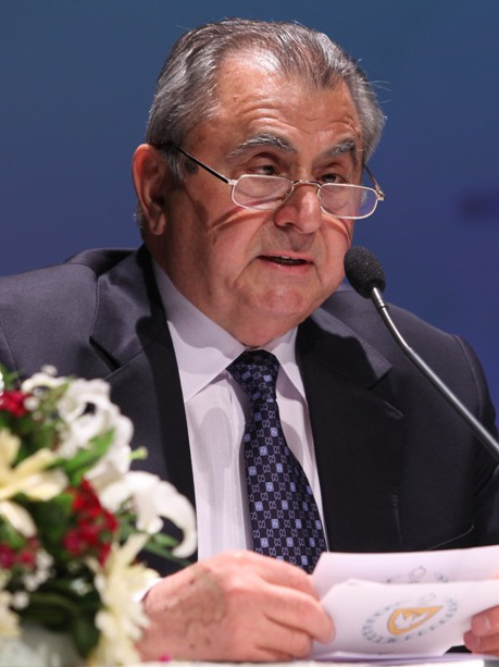 İrsen Küçük